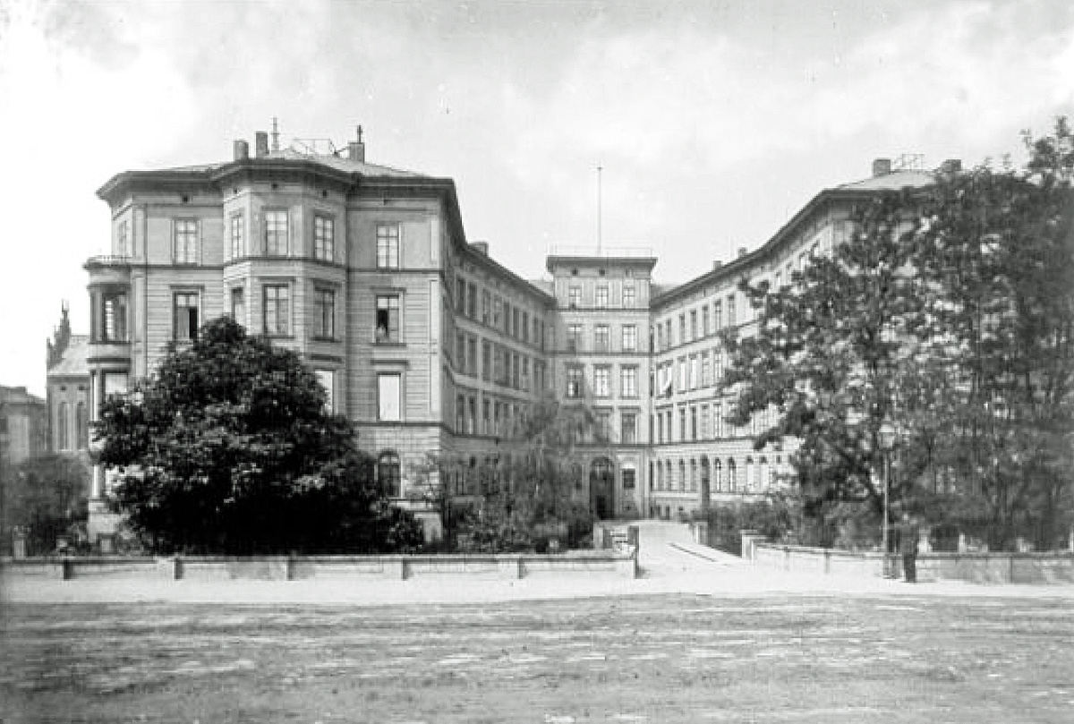 Das von Carl Heine 1846-1848 errichtete Wohnhaus - genannt Das Hufeisen - auf dem Gelände des ehemaligen Rudolphschen Gartens an der Promenade An der Pleiße in Leipzig um 1890 (ab 1898 Rathausring, seit 1933 Martin-Luther-Ring. Links Teil der alten katholischen Trinitatiskirche.